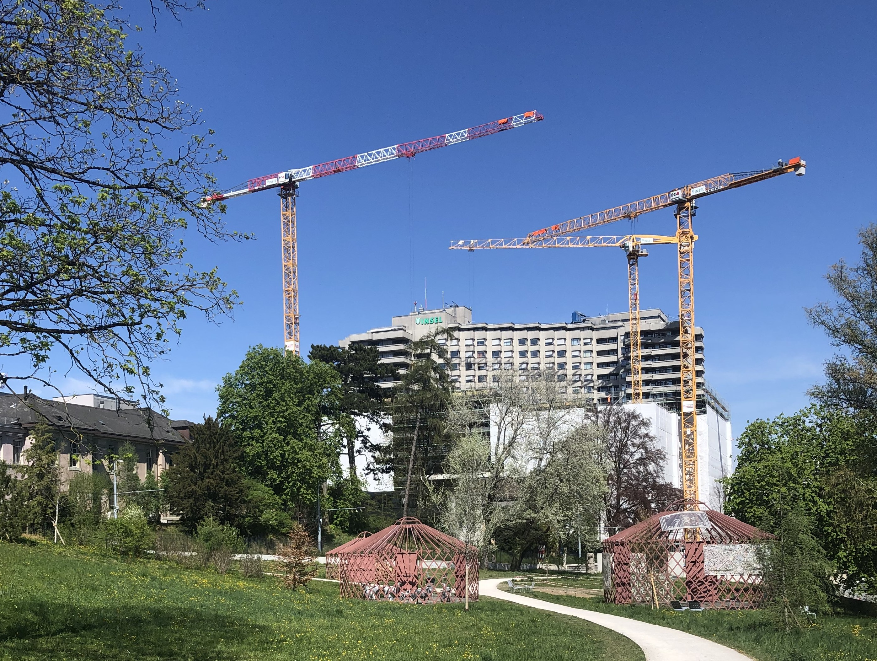 Inselspital Neubau vom Inselpark